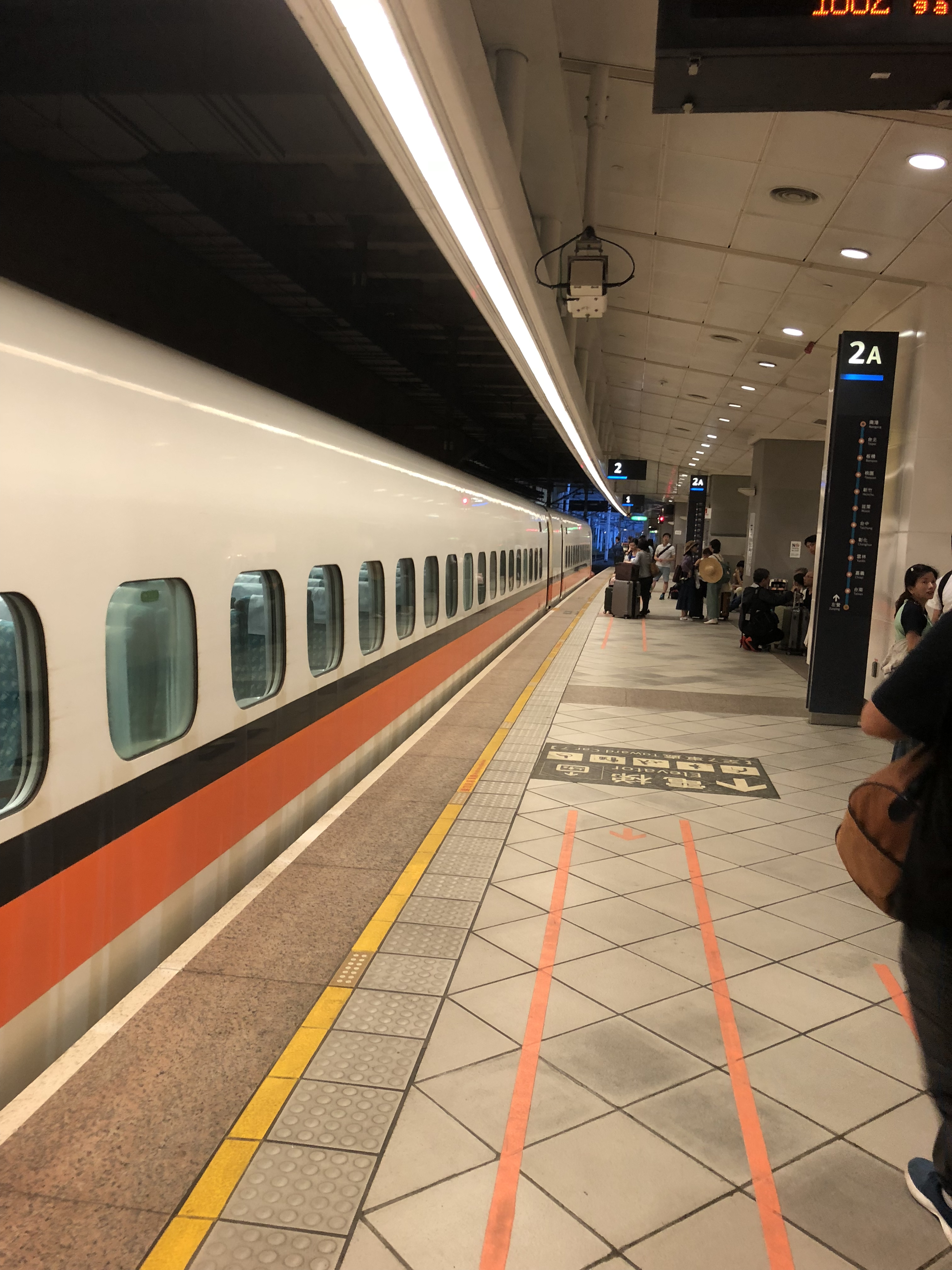 台湾高铁左营站2A月台。